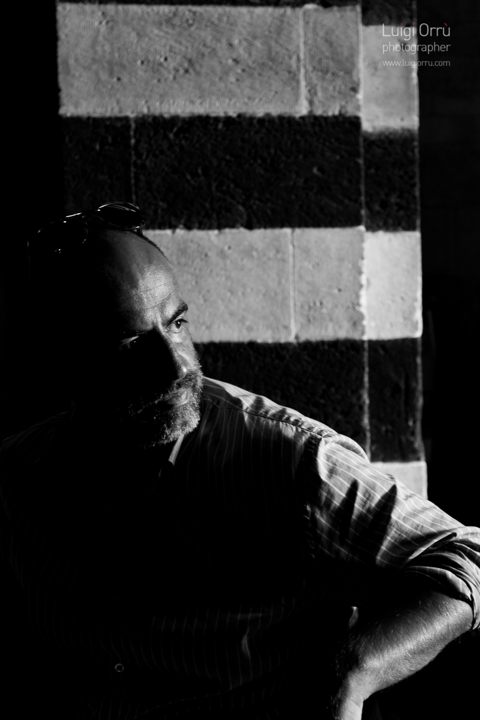 Pietro Mereu sul set de I Manager di Dio